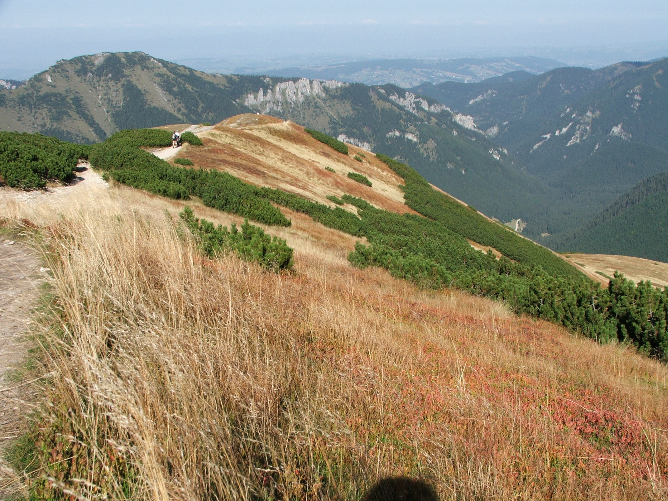 Grześ (West Tatra Mountains)